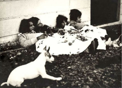 Sesión de fotos de Almendra